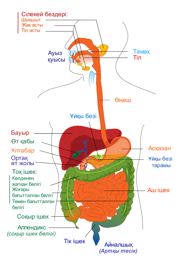 Асқорту жүйесінің диаграмасы